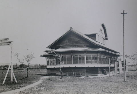 小牛田競馬場投票所の写真。昭和14年頃撮影